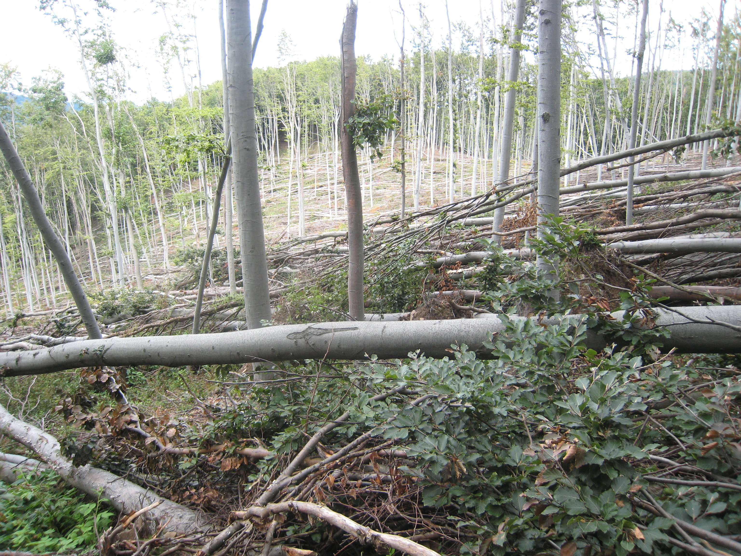 A jégtörés okozta állománydőlés (Börzsöny)